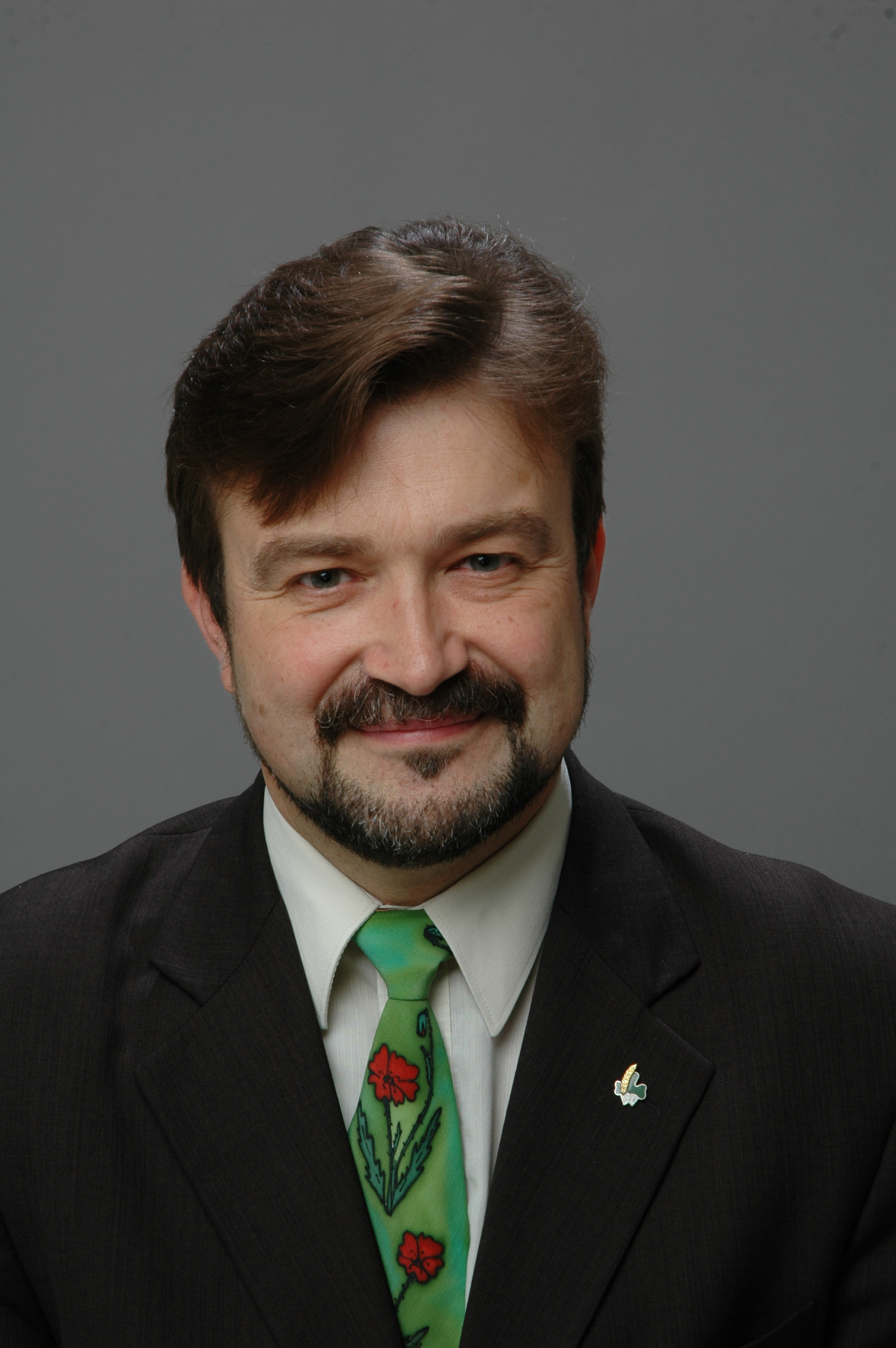 Foto: Saeima